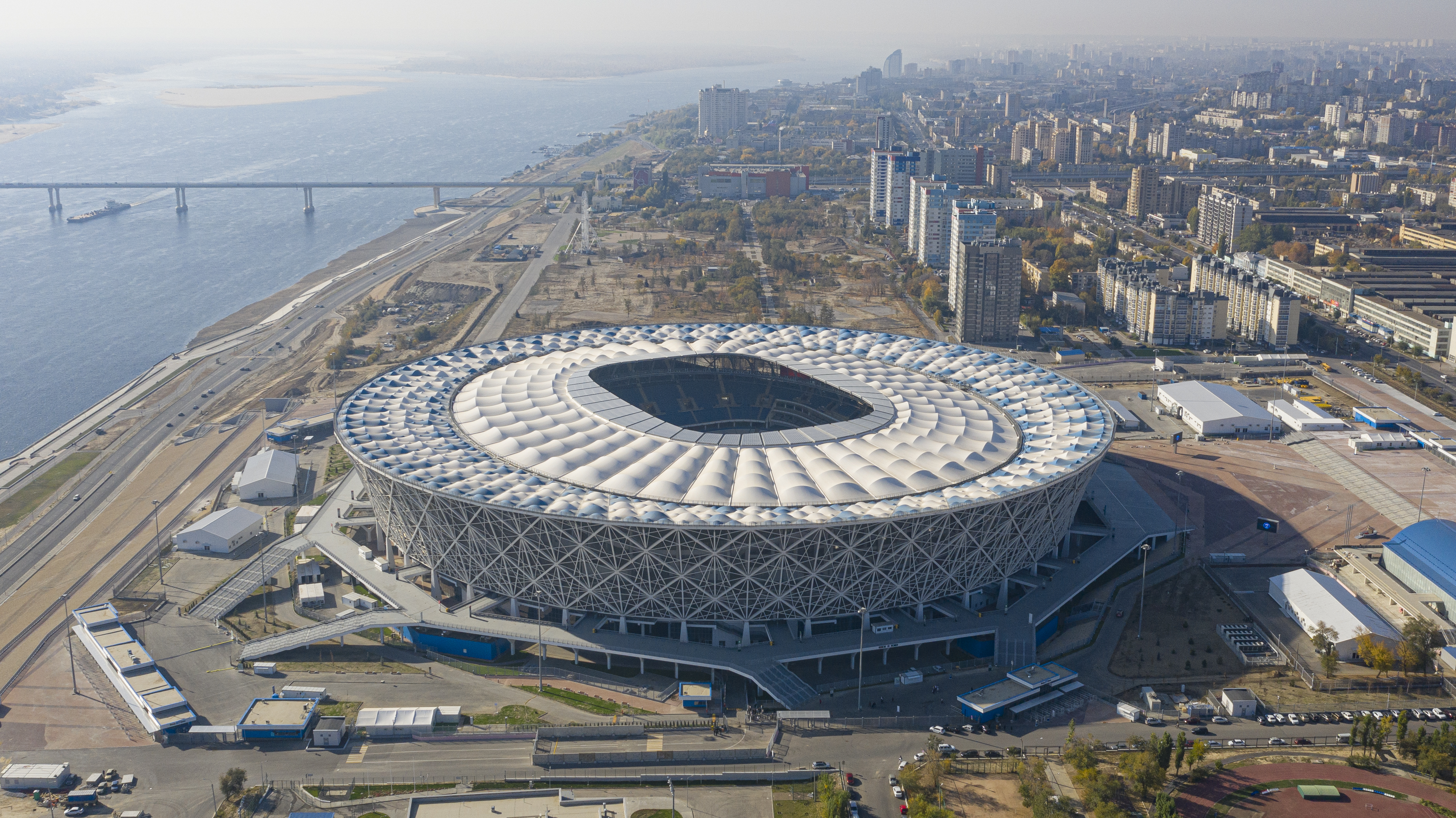 Volgograd Arena